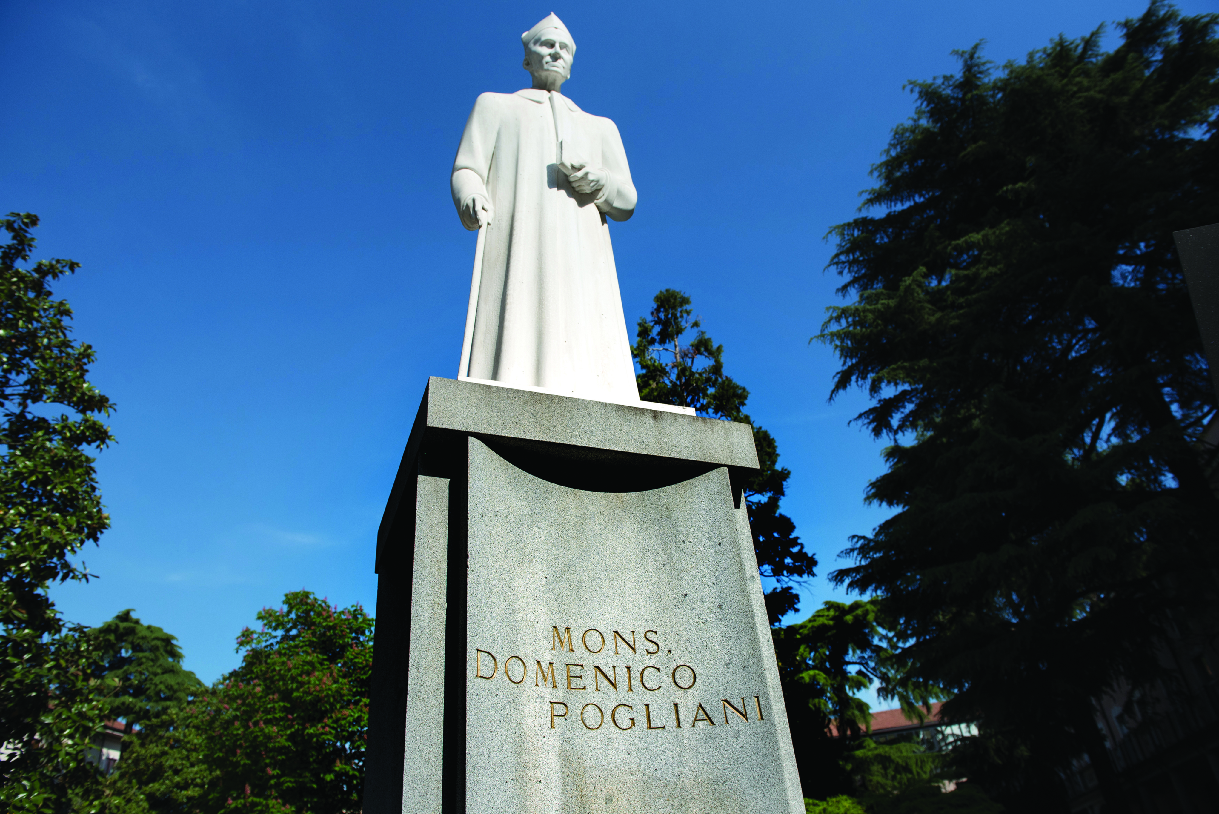 Statua del fondatore di Sacra Famiglia, don Domenico Pogliani, nella sede di Cesano Boscone